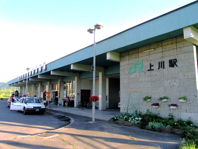 駅舎 撮影場所 上川駅駅横空地 撮影者によるGFDLリリース